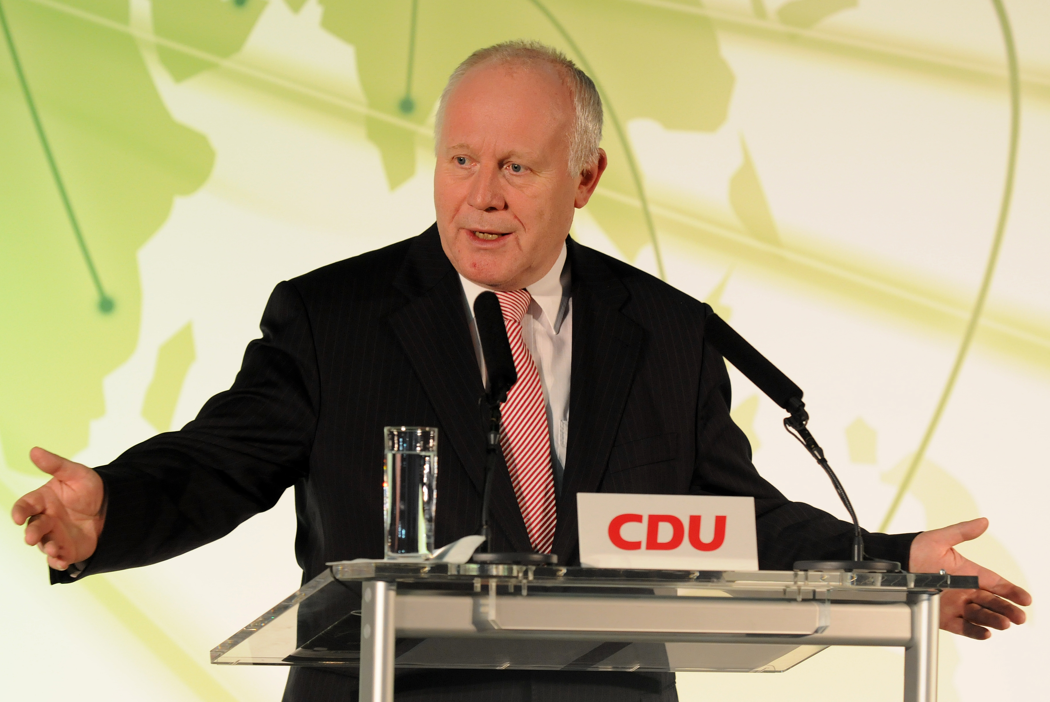 Georg Milbradt bei der 4. InternetNight der Sächsischen Union am 28. Januar 2008 in Dresden